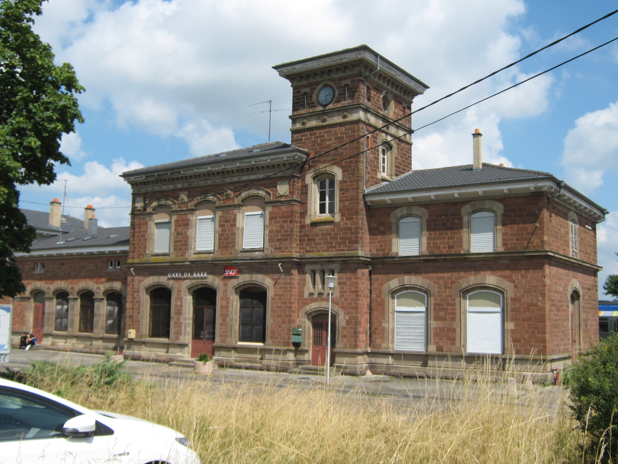 Der Bahnhof von Barr, Frankreich. Blickrichtung Nordost.